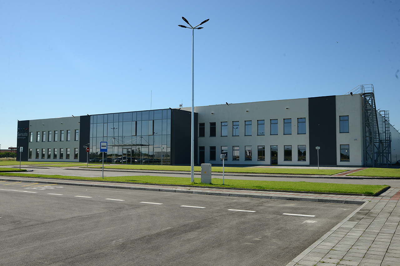 Заводът на "Сенсата Технолоджис" близо до Пловдив